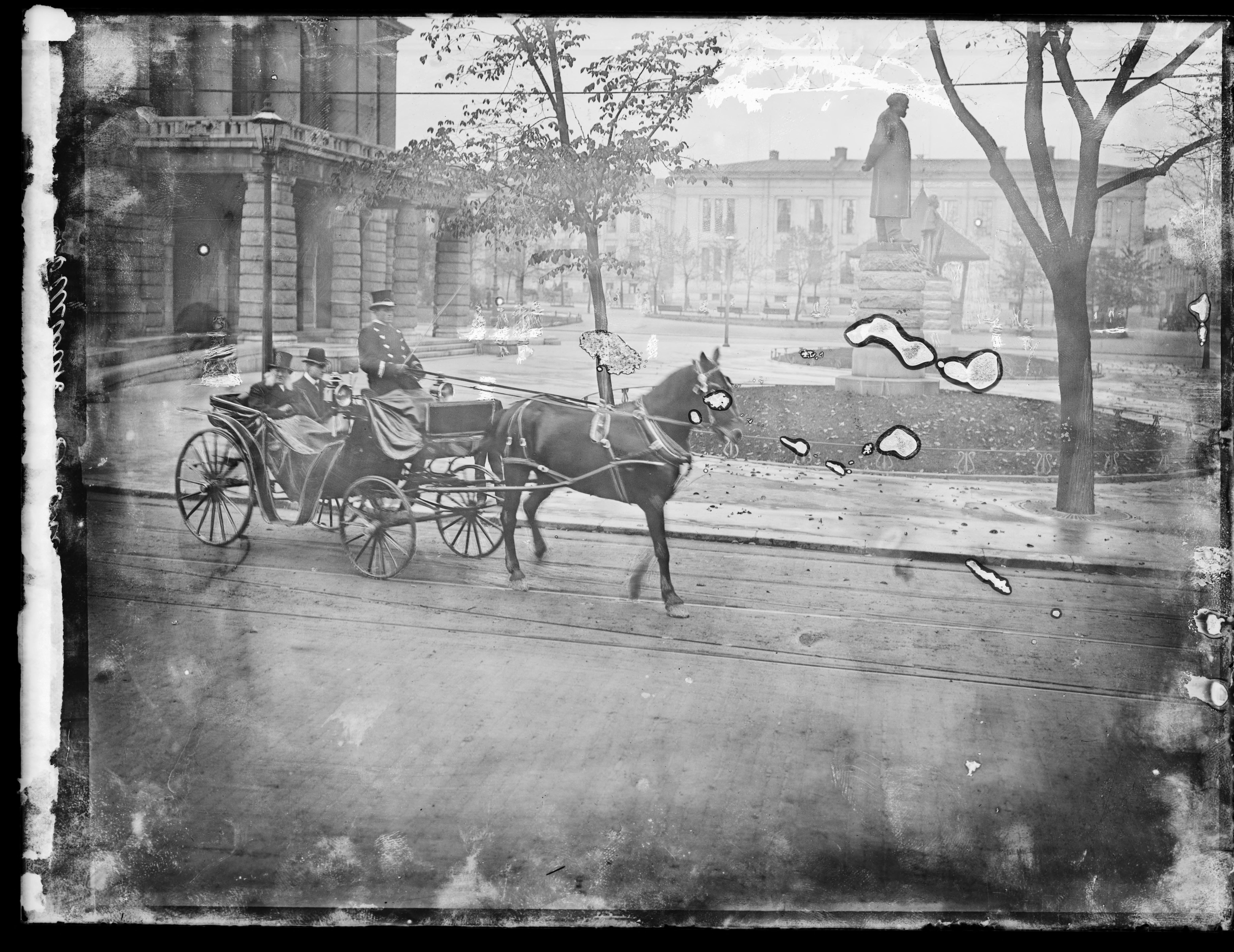 Bildet er hentet fra Nasjonalbibliotekets bildesamling. Anmerkninger til bildet var: Påskrift arkivark: Dr. Henrik Ibsen Eldste arkivnummer: 495 Yngre arkivnummer: 41 Oslo, Oslo, Oslo Depicted person: Ibsen, Henrik